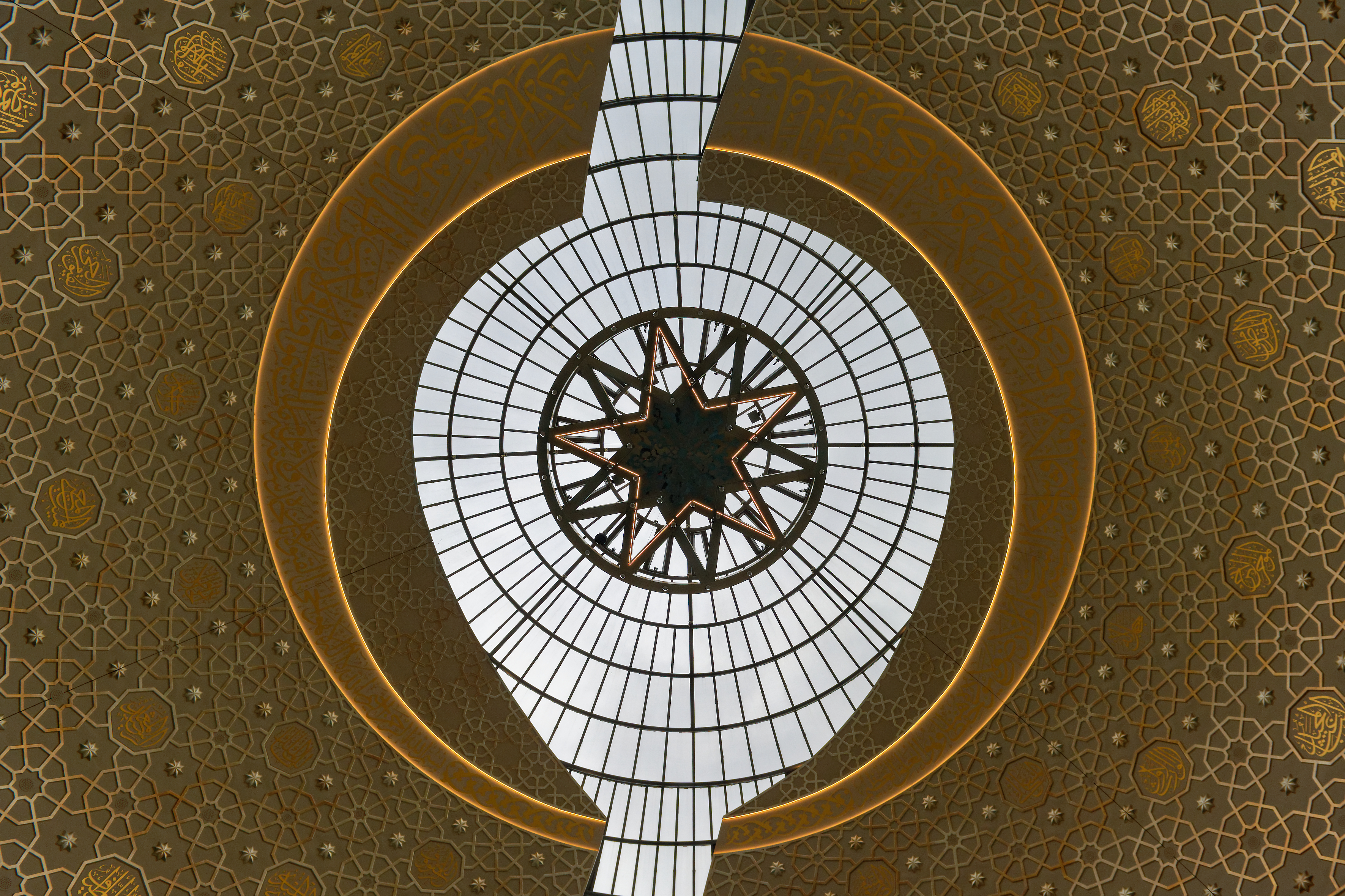 DITIB-Zentralmoschee Köln Tag der offenen Moschee 2019 Kuppel mit Kalligraphie des Thronspruches und zahlreichen Elementen mit weiteren Namen Allahs